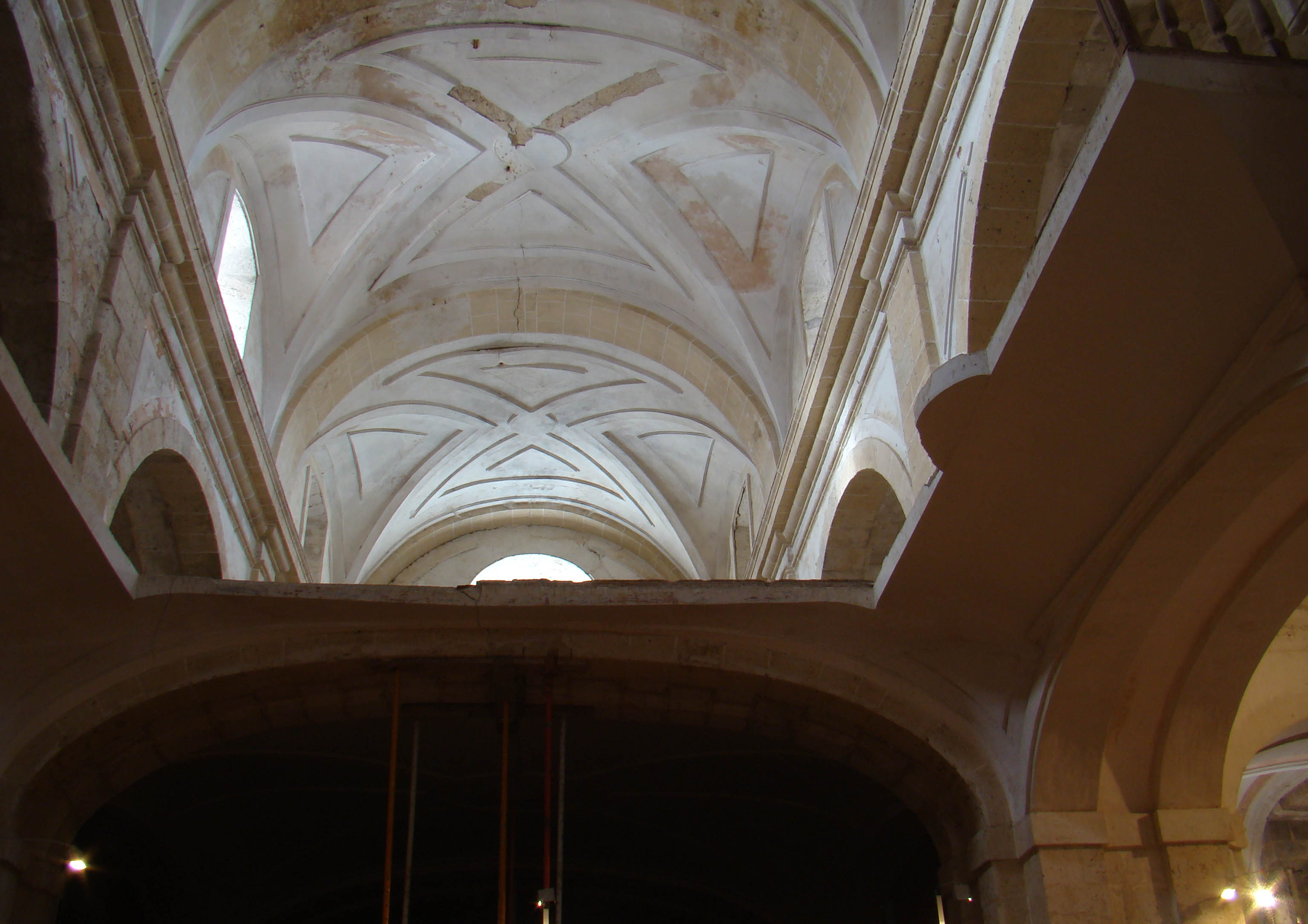 Monasterio de Palazuelos en la provincia de Valladolid. Interior de la iglesia. Coro consolidado pero sin restaurar. Bóvedas de Juan de Nates, siglo XVI.